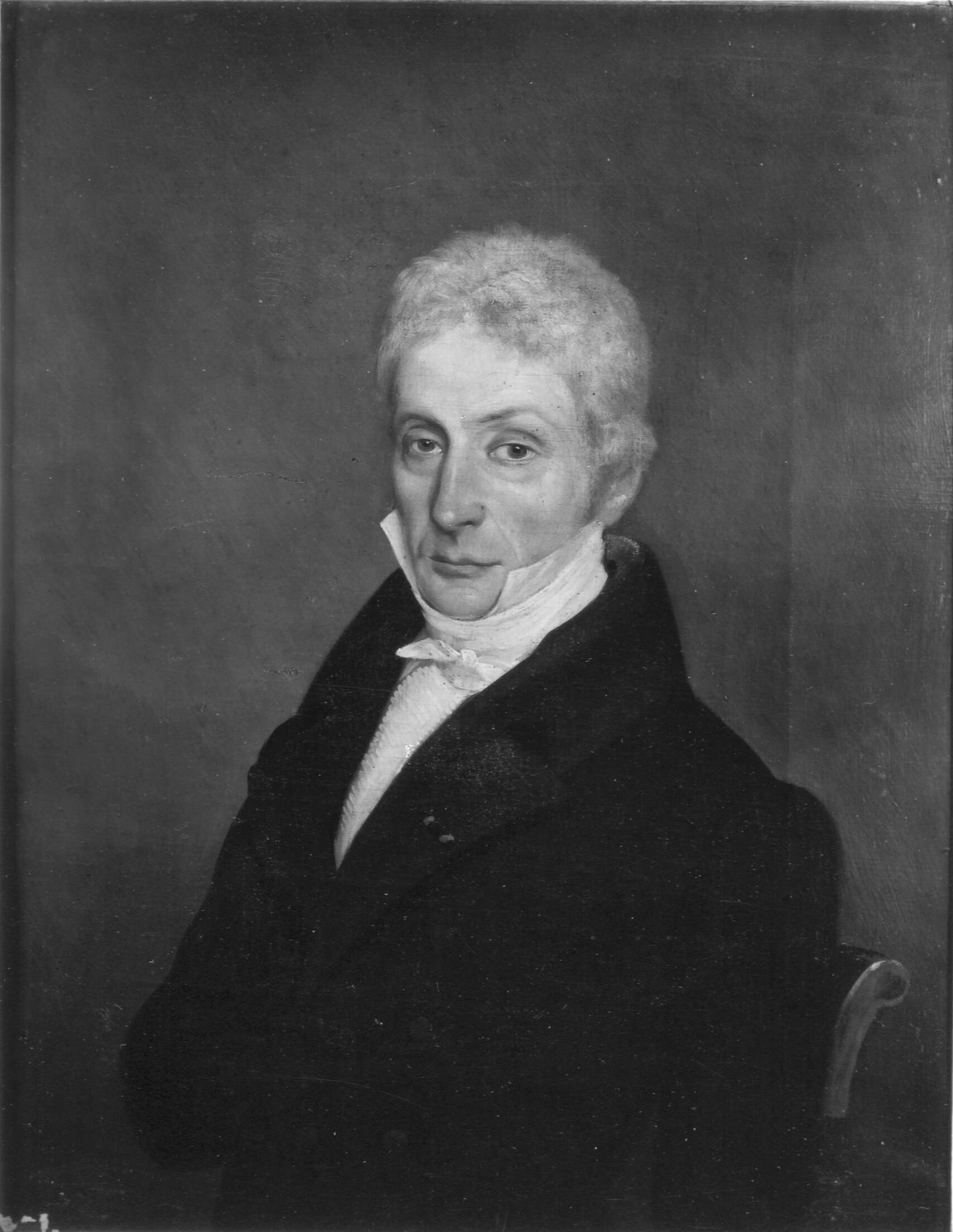 Dirk Reinhard Johan van Lijnden (1779-1837)